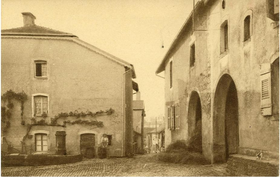 Maison natale du chanoine Henri Colin vers 1900, à gauche de la carte.